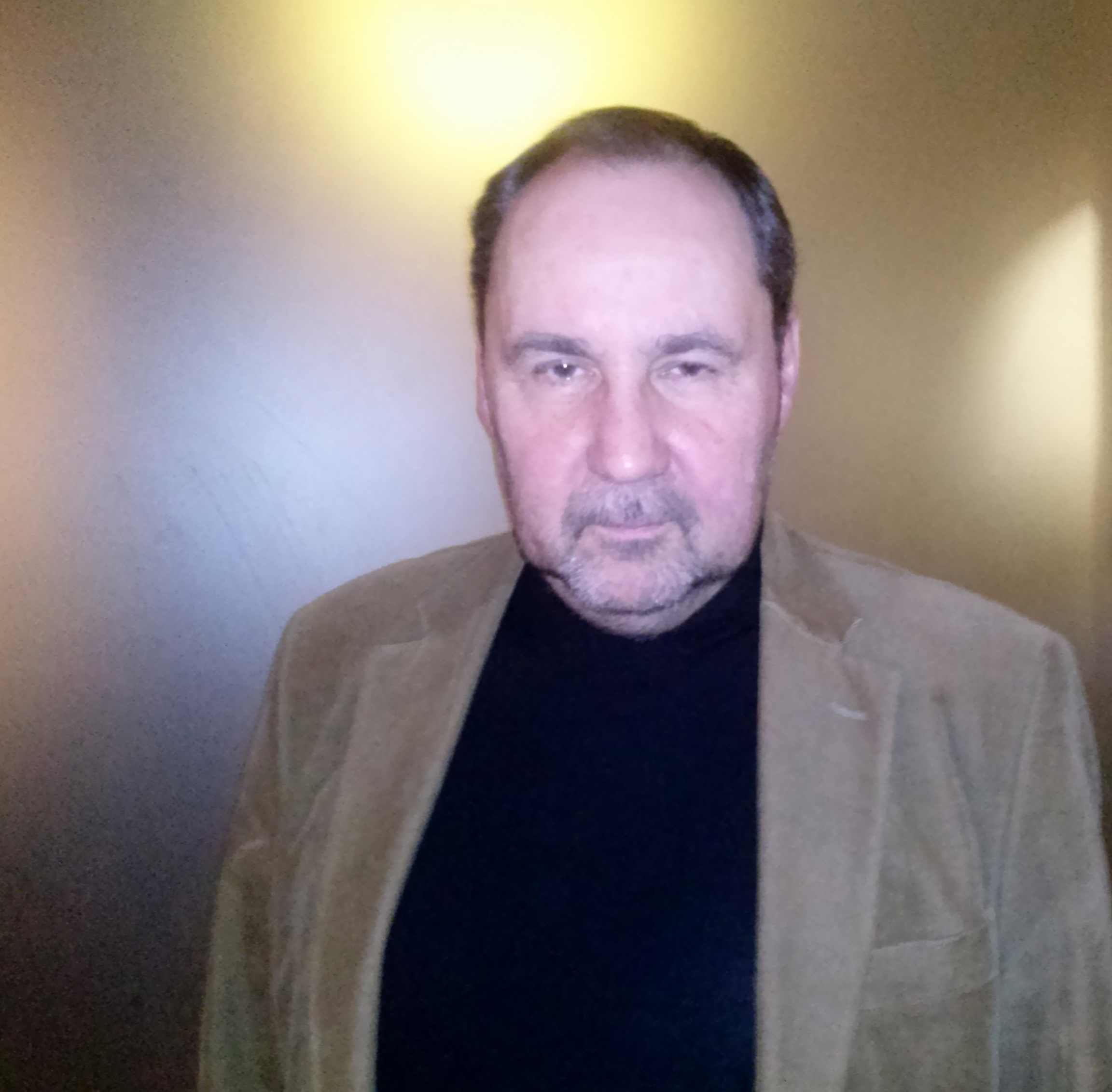 Tiit Sinissaar 2015